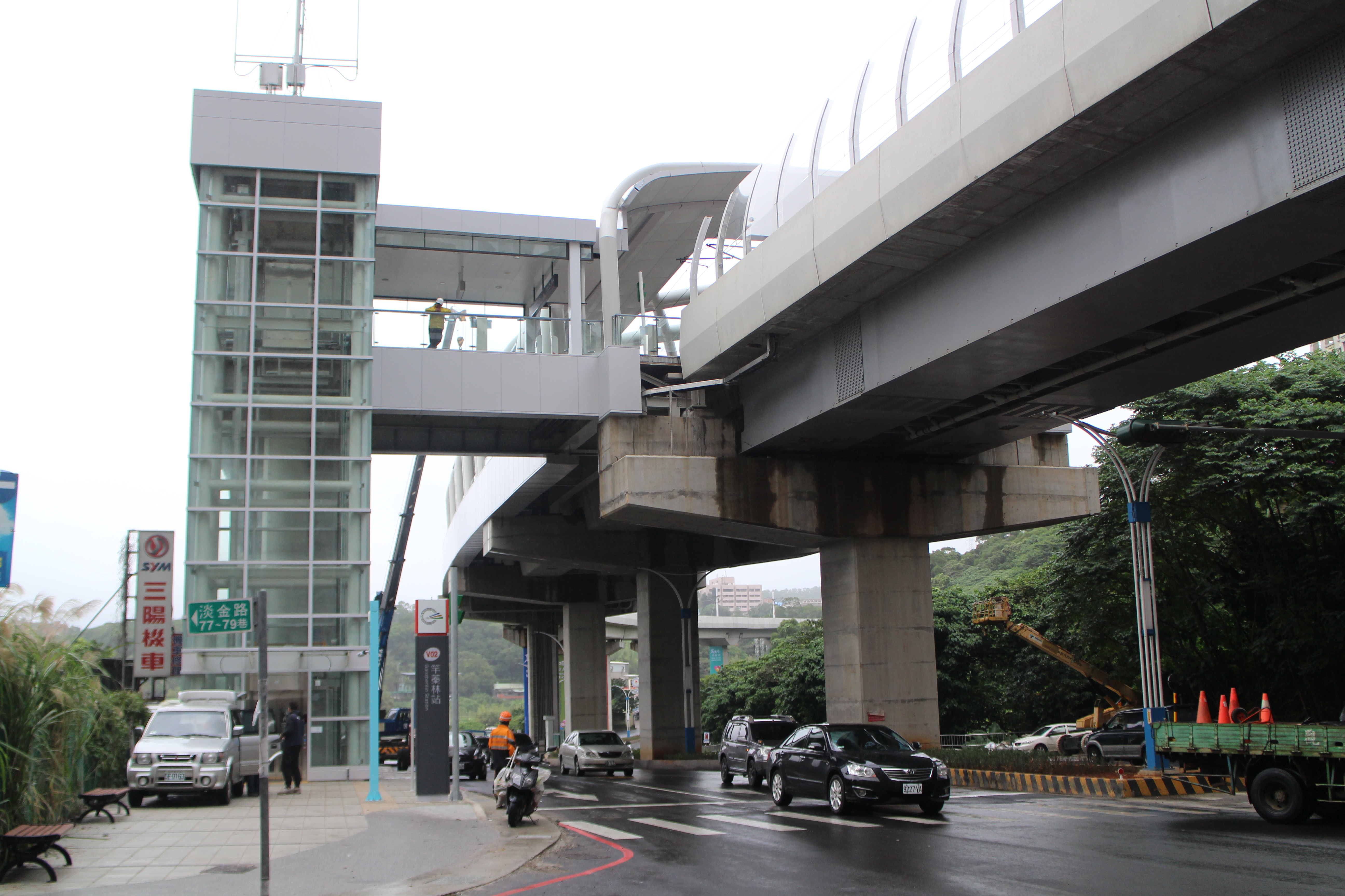 淡海輕軌竿蓁林站出口